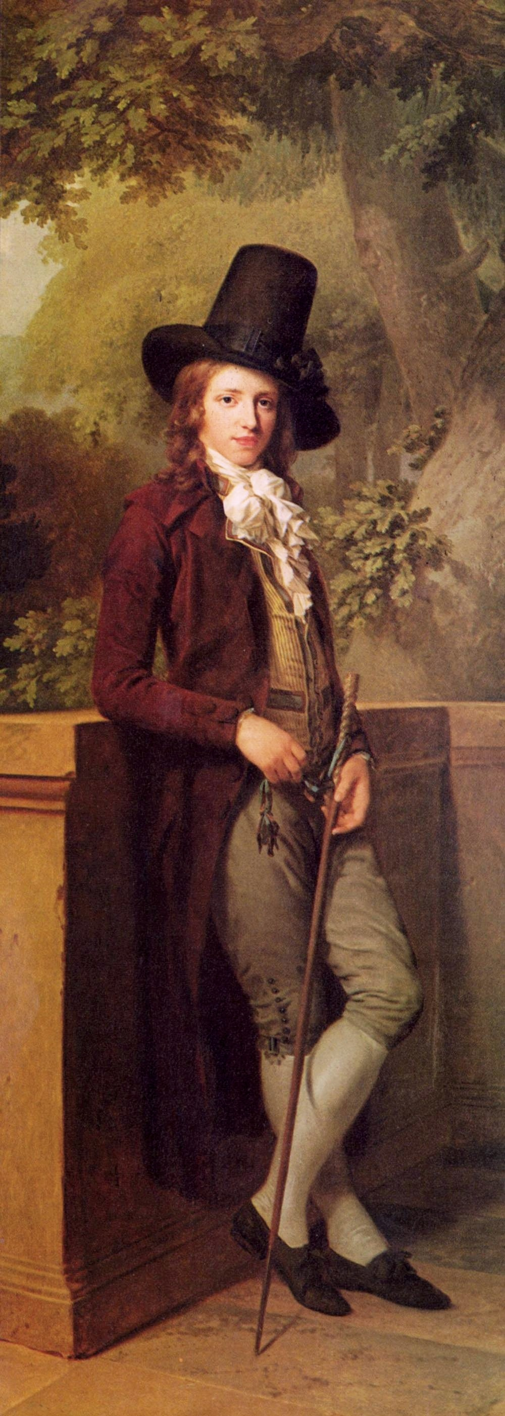 detail